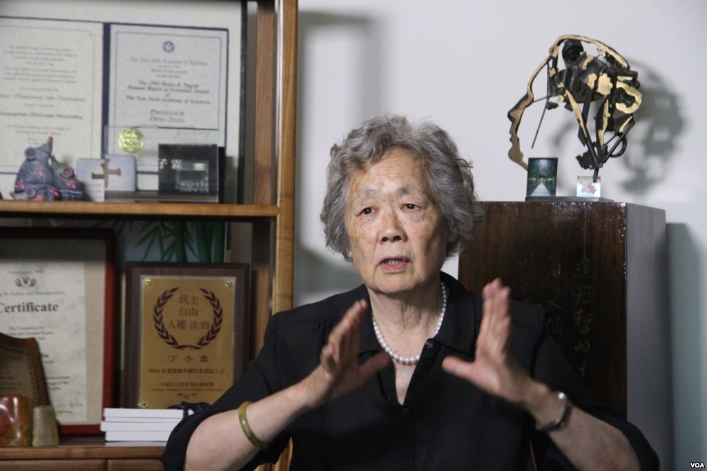 丁子霖女士接受美國之音衛視採訪。